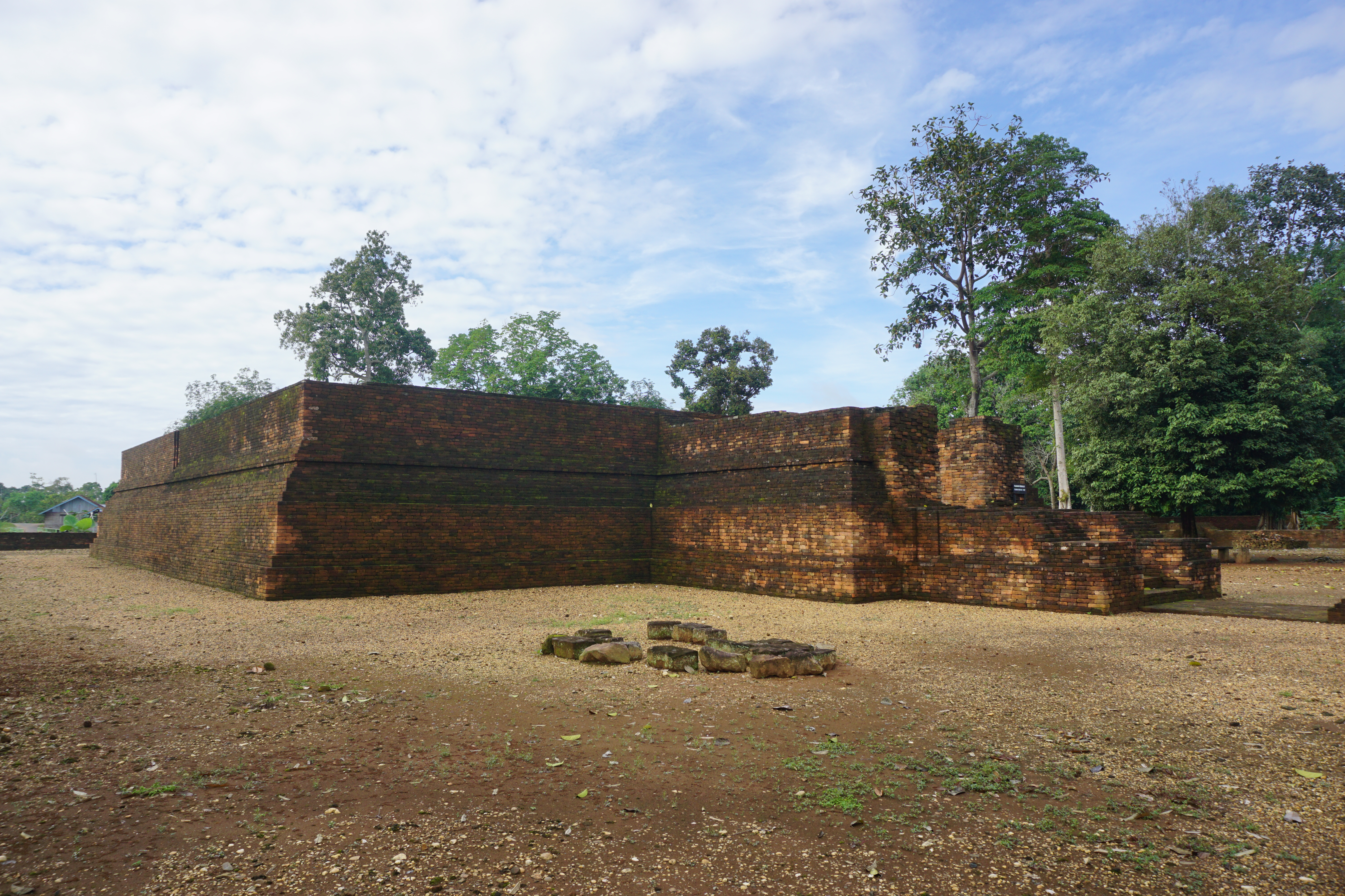 075 Main Candi, Candi Kedaton, Muara Jambi, Sumatra